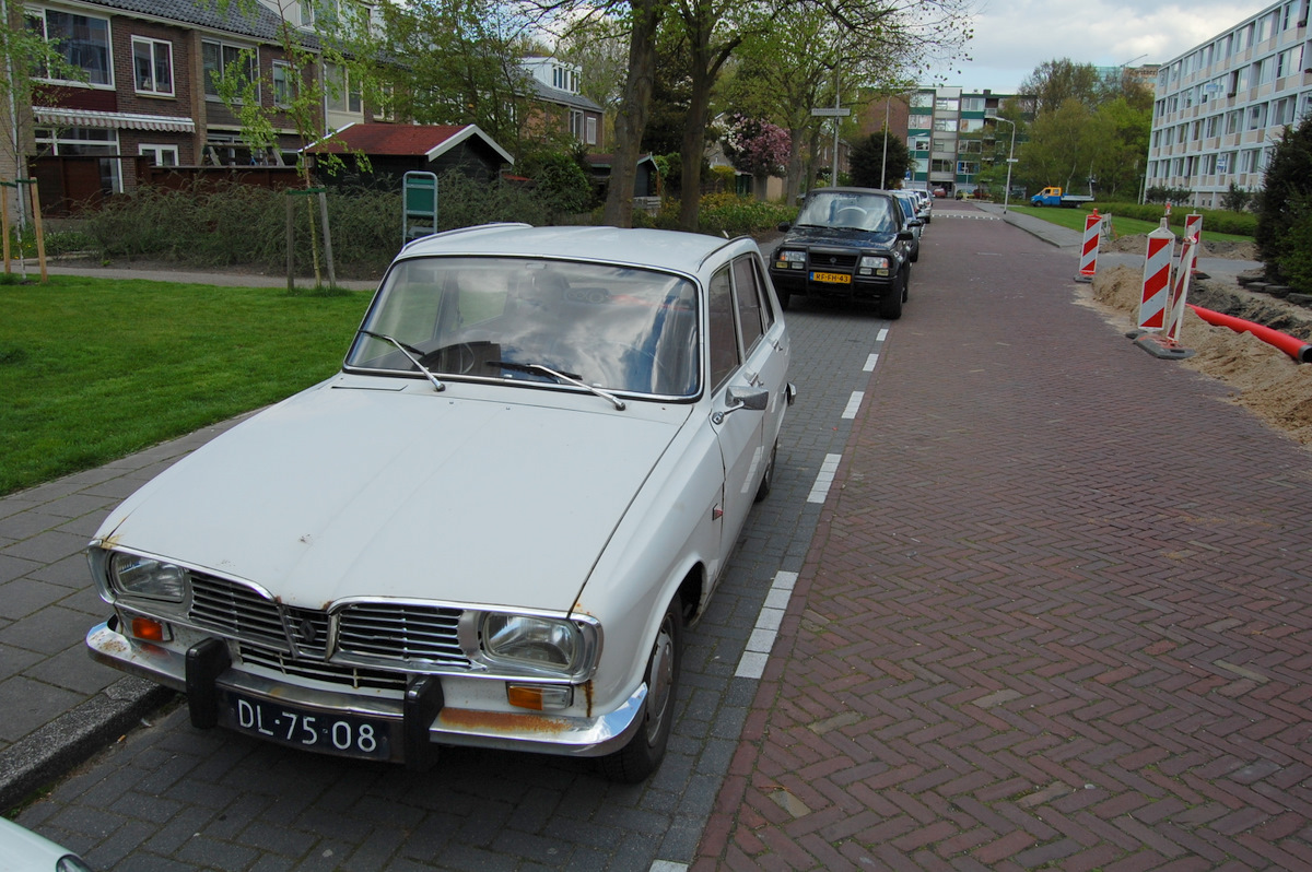 Renault 16!